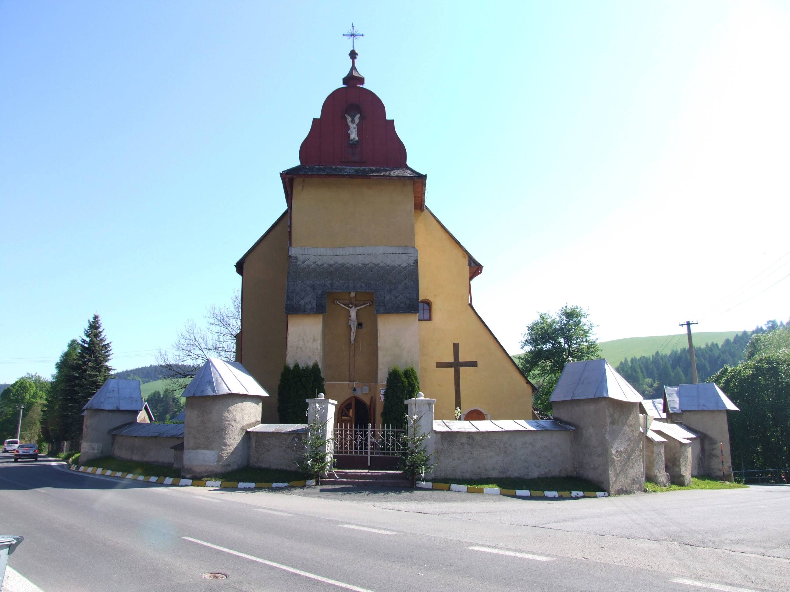 Matiašovce